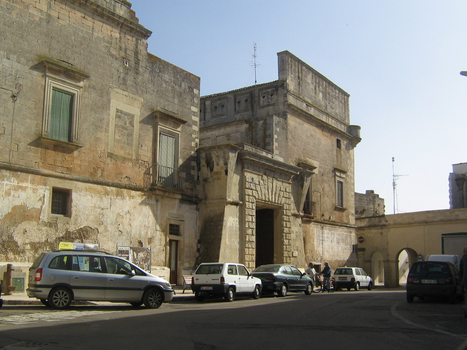 Castello di Cannole